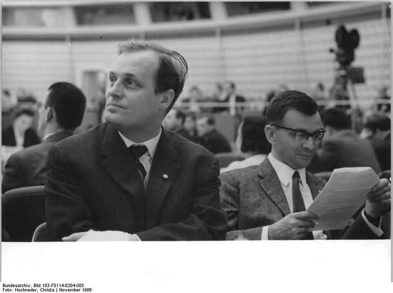 Zentralbild Hochneder 17.1.1967 Berlin: 1. Jahreskonferenz des Deutschen Schriftstellerverbandes vom 2.11.-4.11.1966 in der Kongreßhalle Der Schriftsteller Herbert Nachbar und der Hauptabteilungsleiter der Dramaturgie-Produktion des Berliner Rundfunks, Manfred Engelhardt (links).